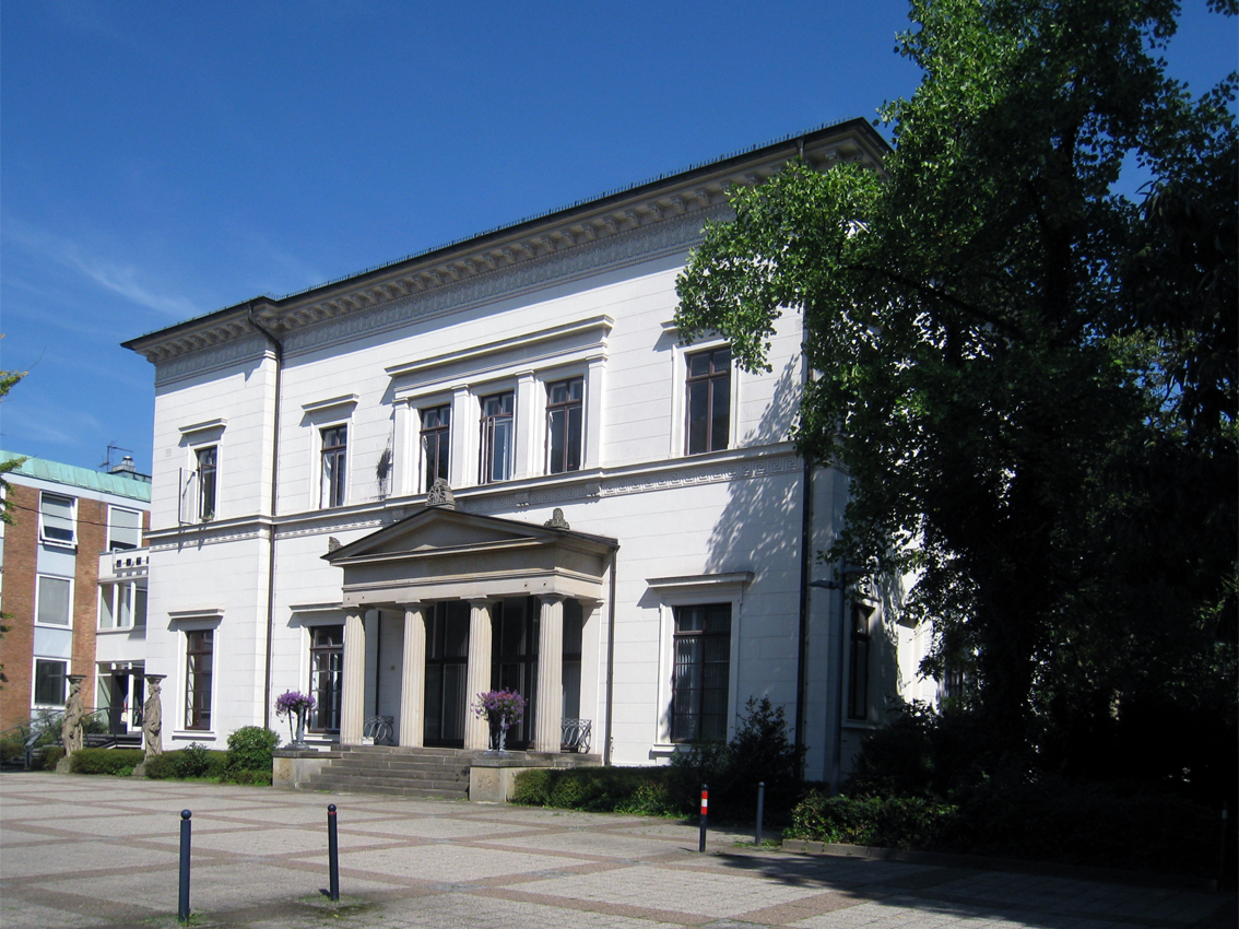 Villa Lürman, Senator für Inneres in Bremen, Contrescarpe 22, 23, 24.Das abgebildete Objekt ist ein geschütztes Kulturdenkmal in der Freien Hansestadt Bremen, mit der Nr. 0276 beim Landesamt für Denkmalpflege registriert.